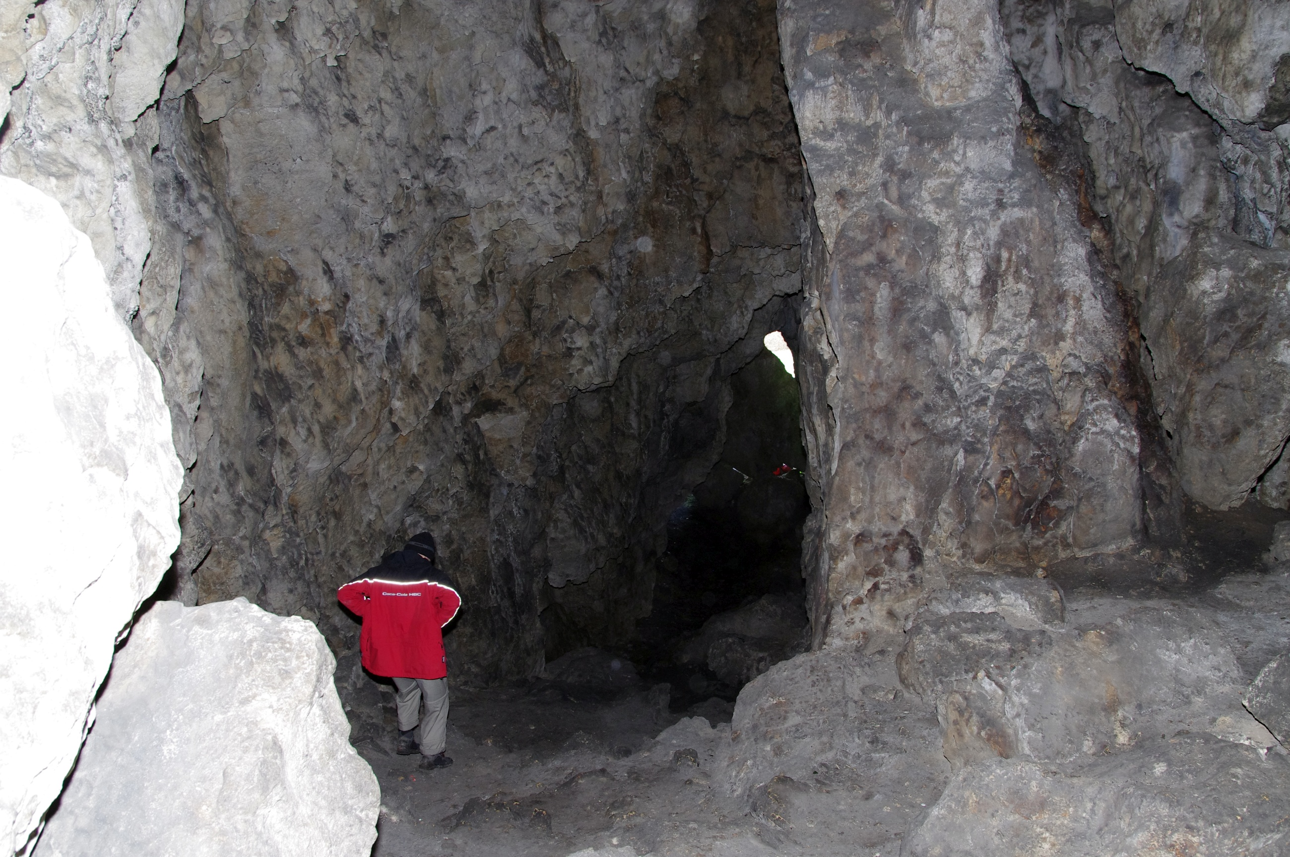 Jaskinia Łabajowa w Dolinie Będkowskiej